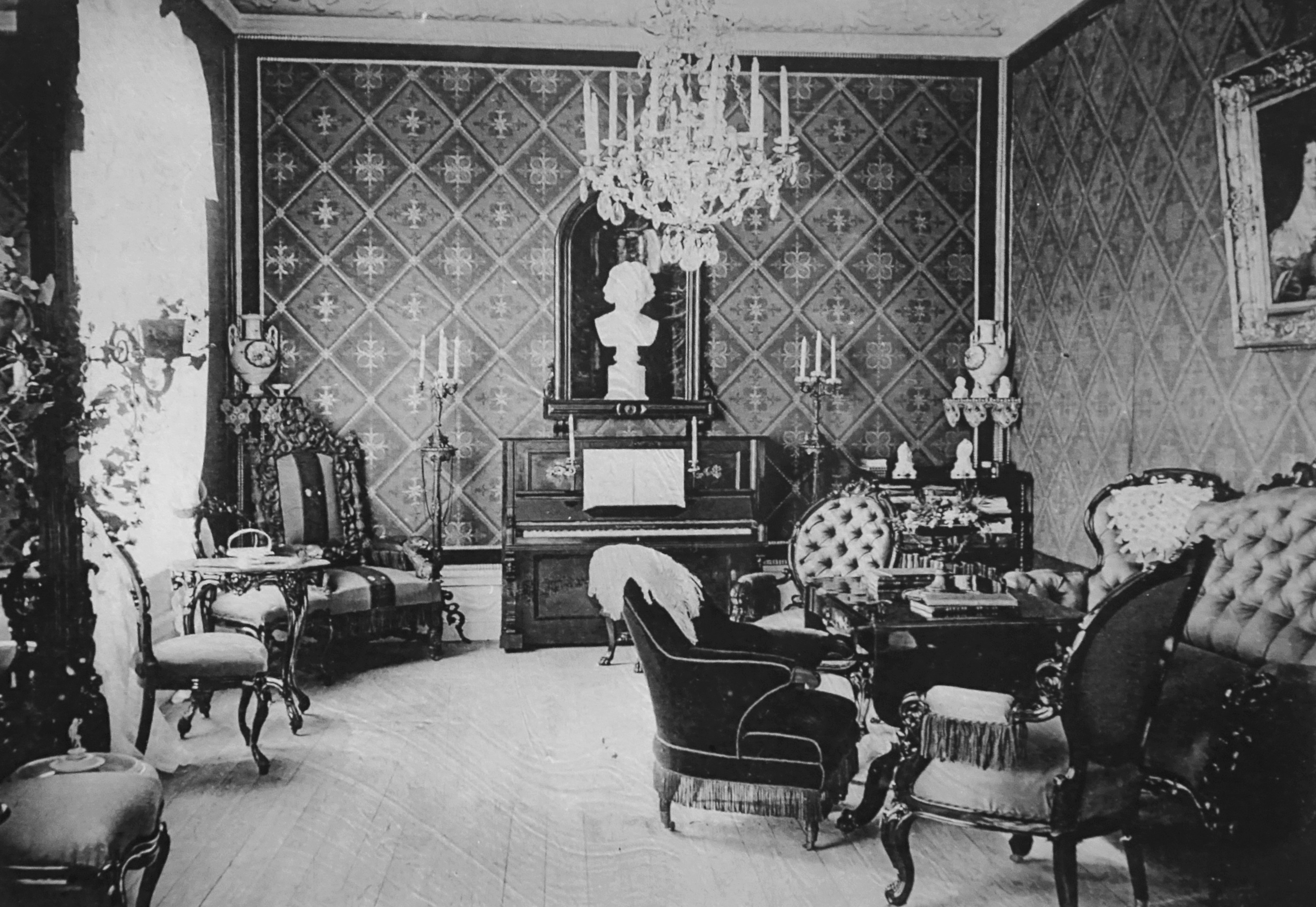 Lövsta gård, Enhörna, salongen